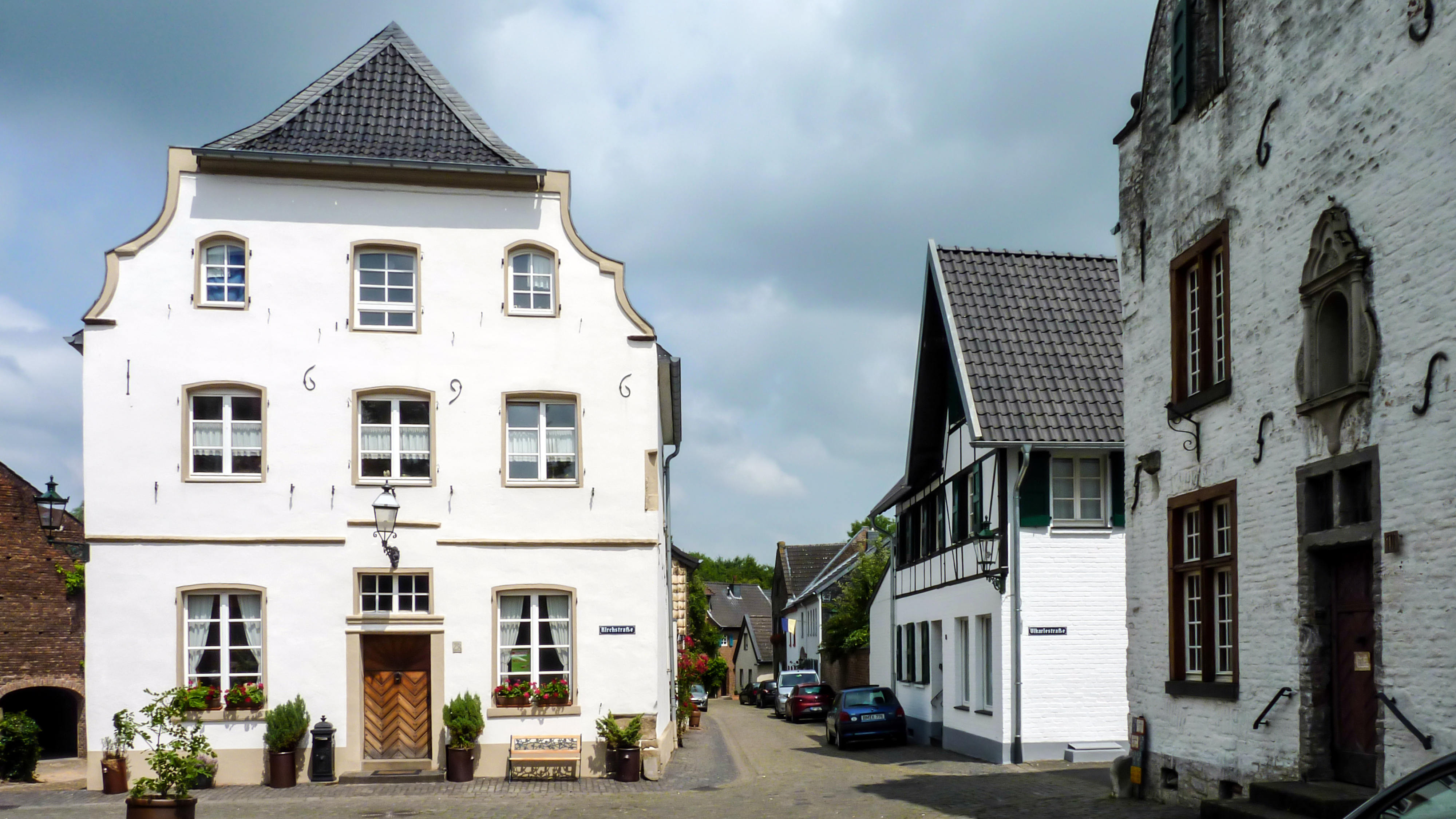 Denkmalgeschütztes Wohnhaus in Alt-Kaster Kirchstraße 28